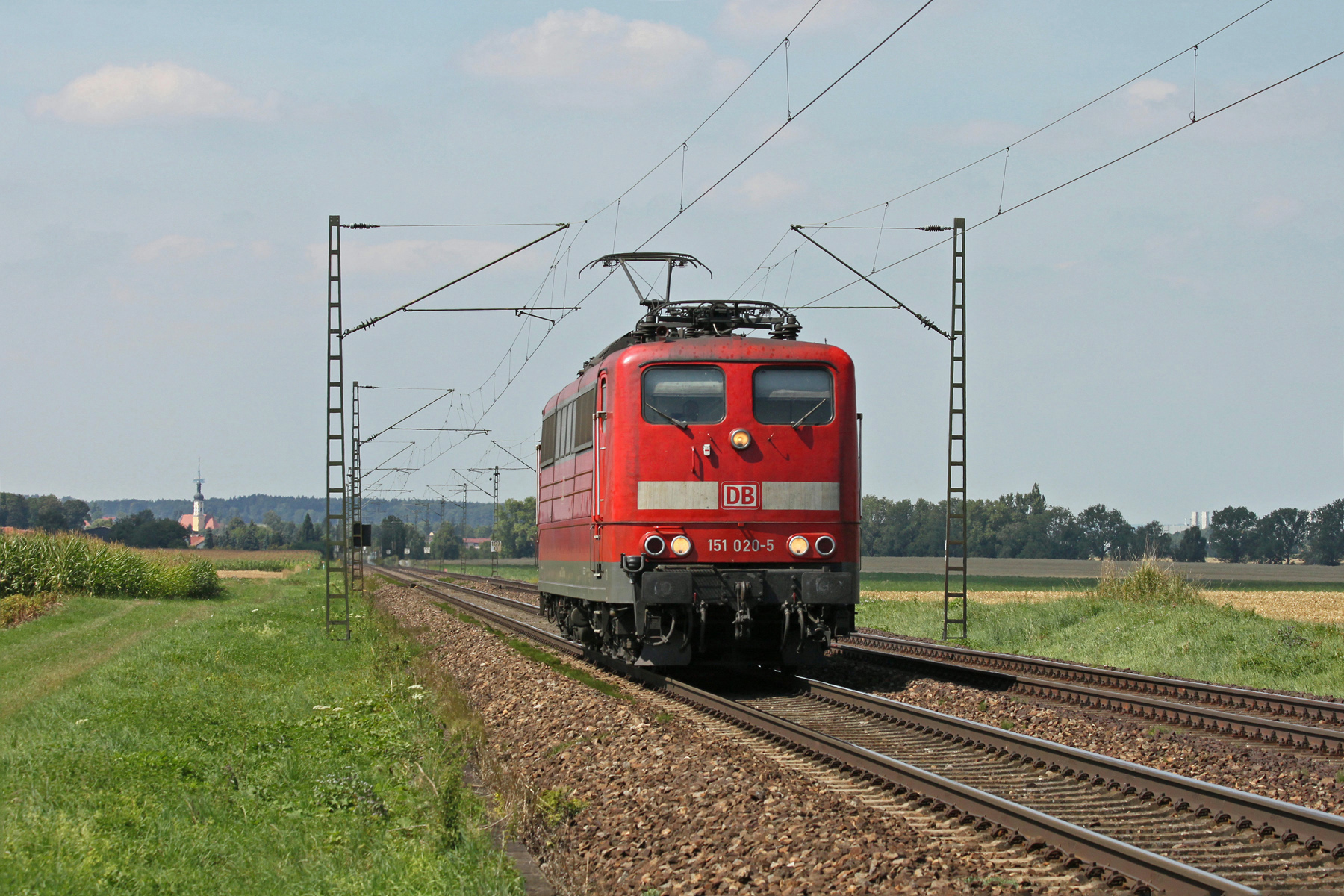 Mintraching Lok ind Durchfahrt von OT Mangolding